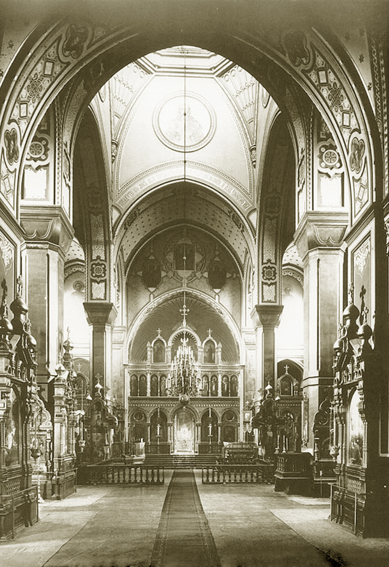 Иконостас и внутреннее убранство церкви св. Мирония Лейб-егерского полка